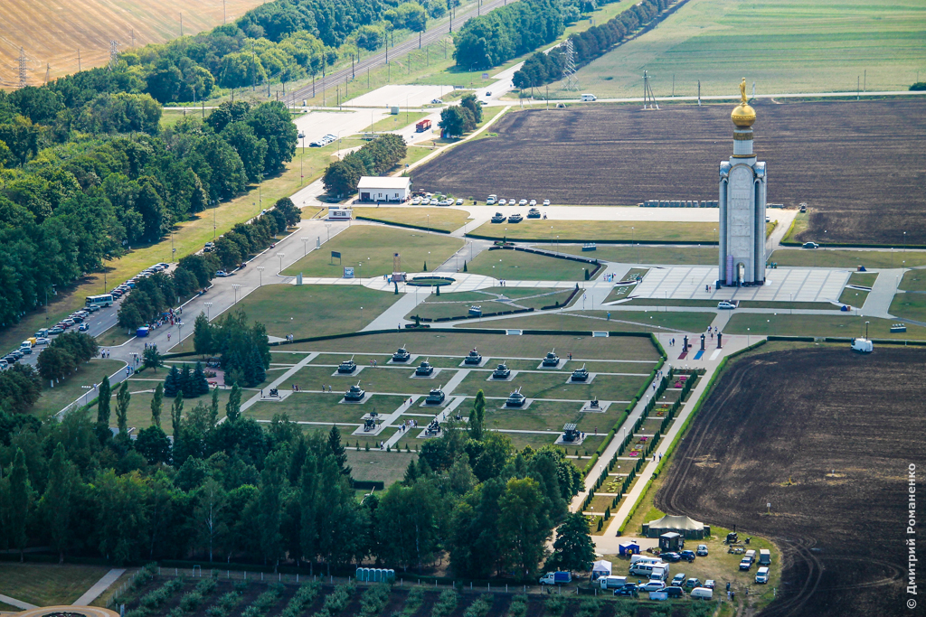 Фестиваль «Небосвод Белогорья» 2014 в Прохоровском районе Белгородской области. 2 августа 2014 года.